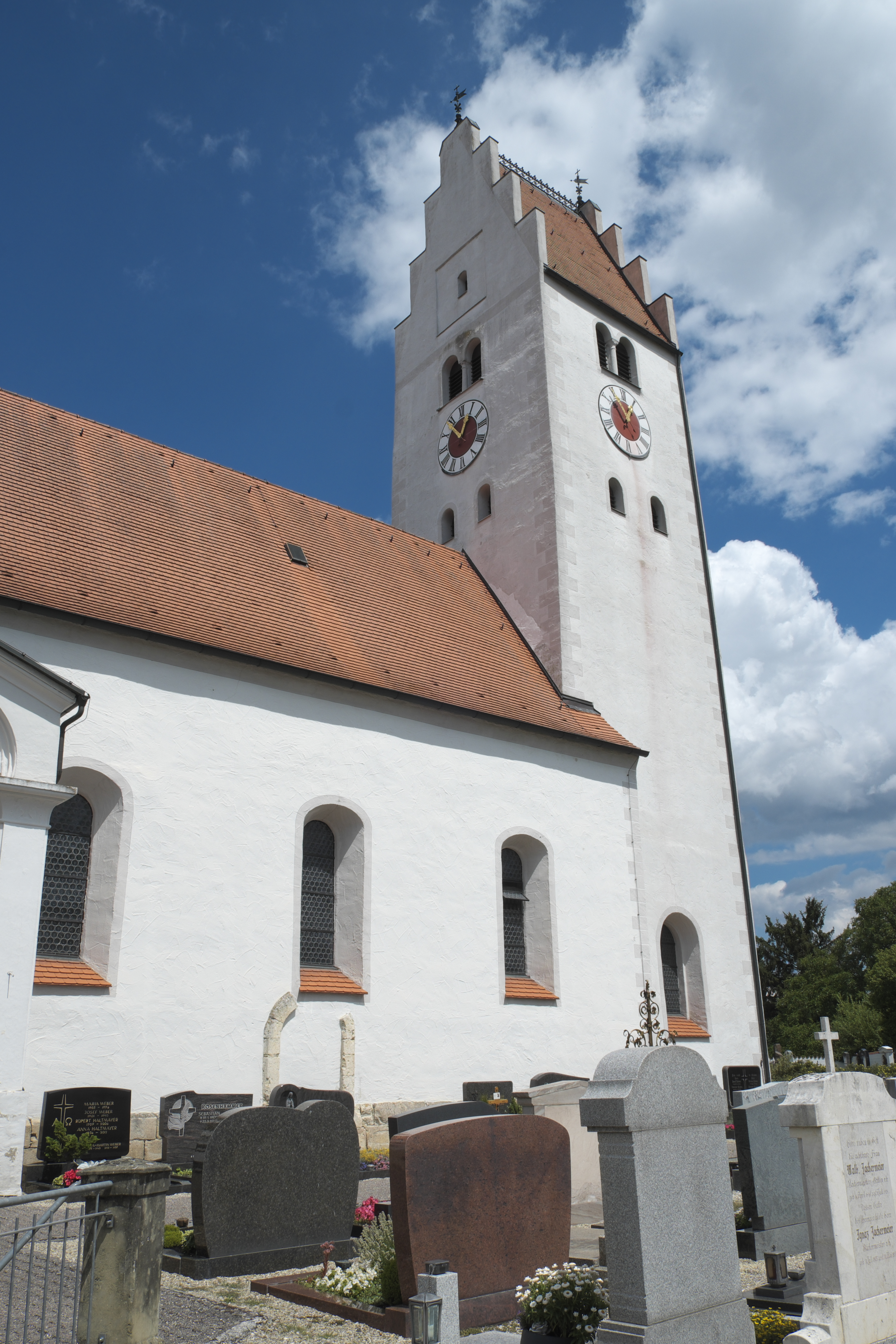 Katholische Kirche St. Georg in Hienheim (Neustadt an der Donau) im niederbayerischen Landkreis Kelheim (Bayern/Deutschland)